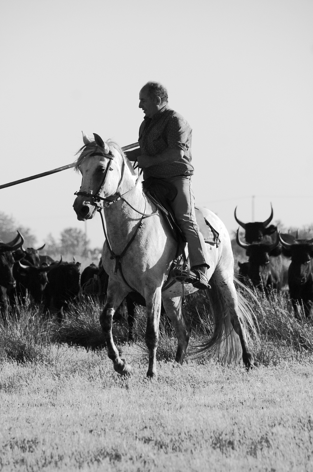 Gardian armé de son trident dirigeant sa manade